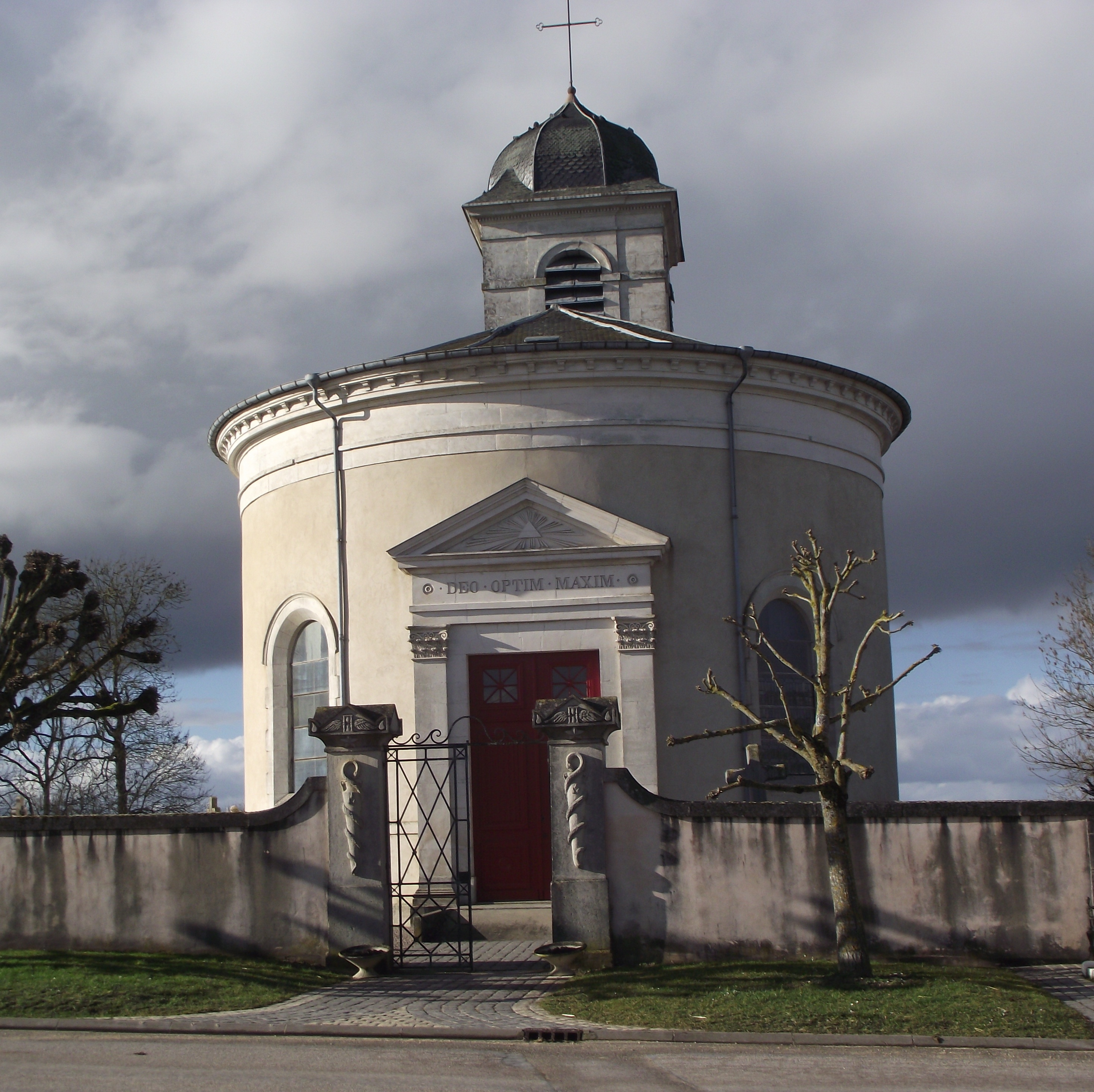 l'église est située dans la rue pricipale